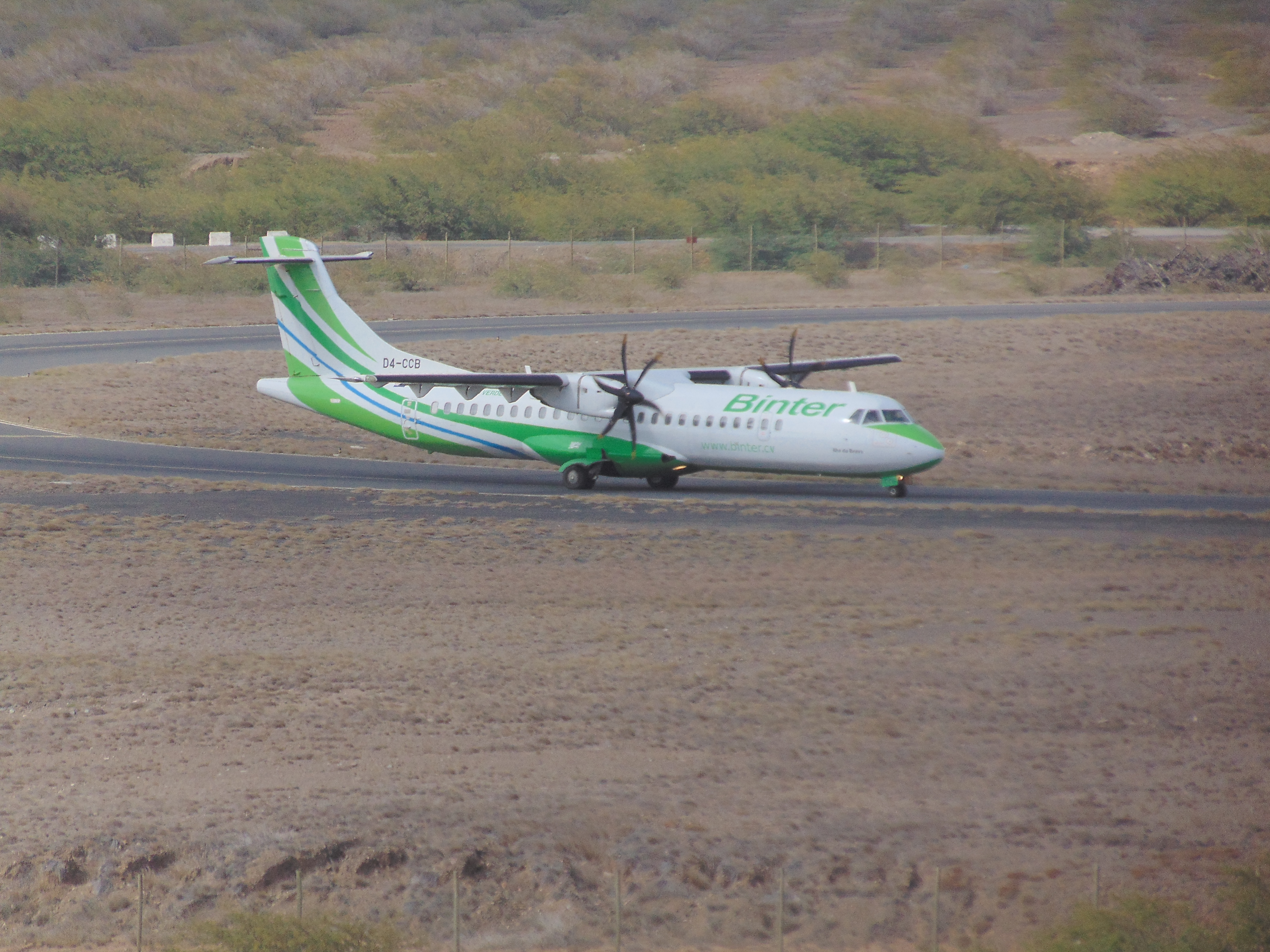 Vista frontale di ATR binter